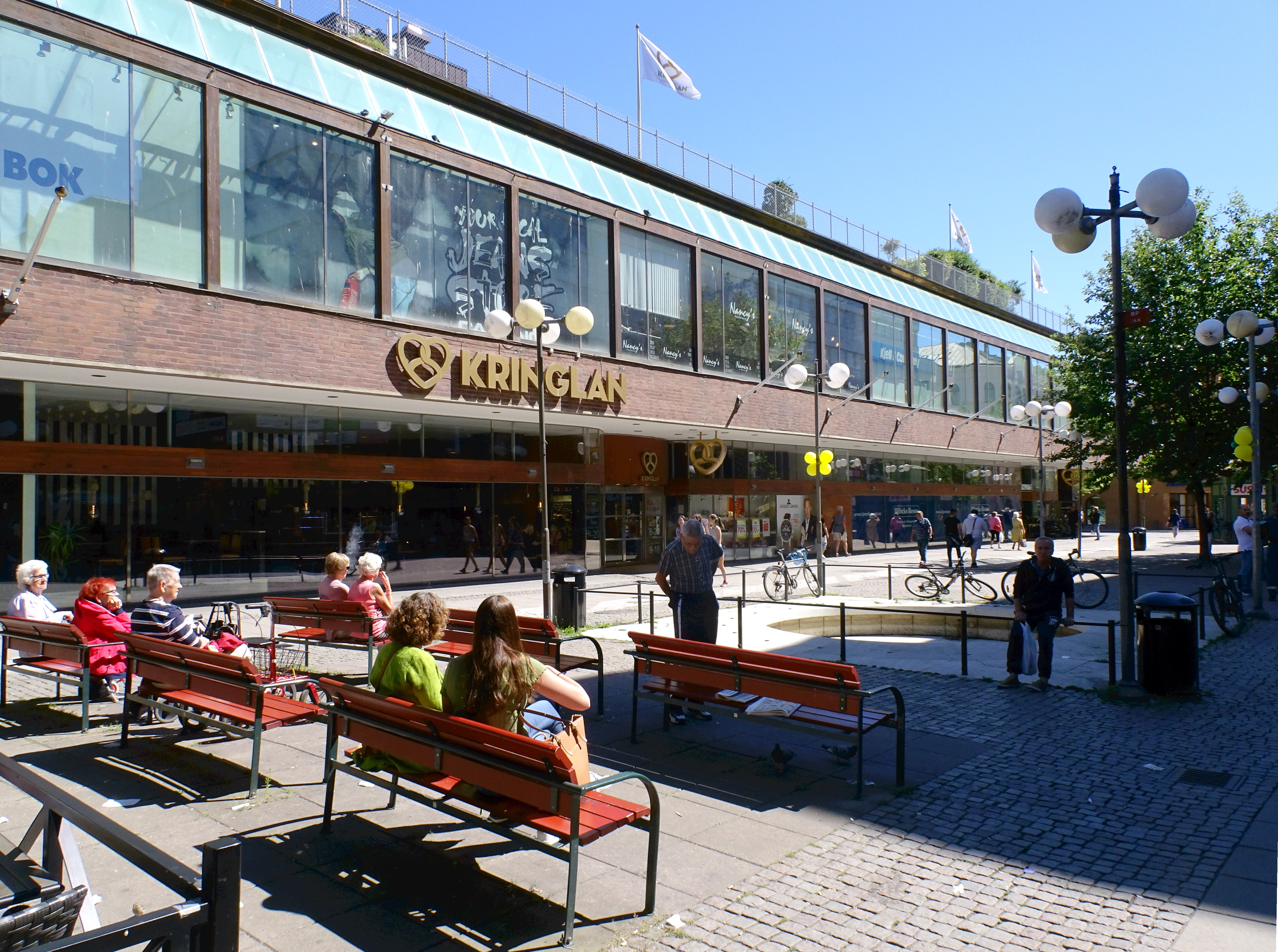 Storgatan Södertälje med varauhuset "Kringlan" t.v. arkitekt Erik och Tore Ahlsén (1965)